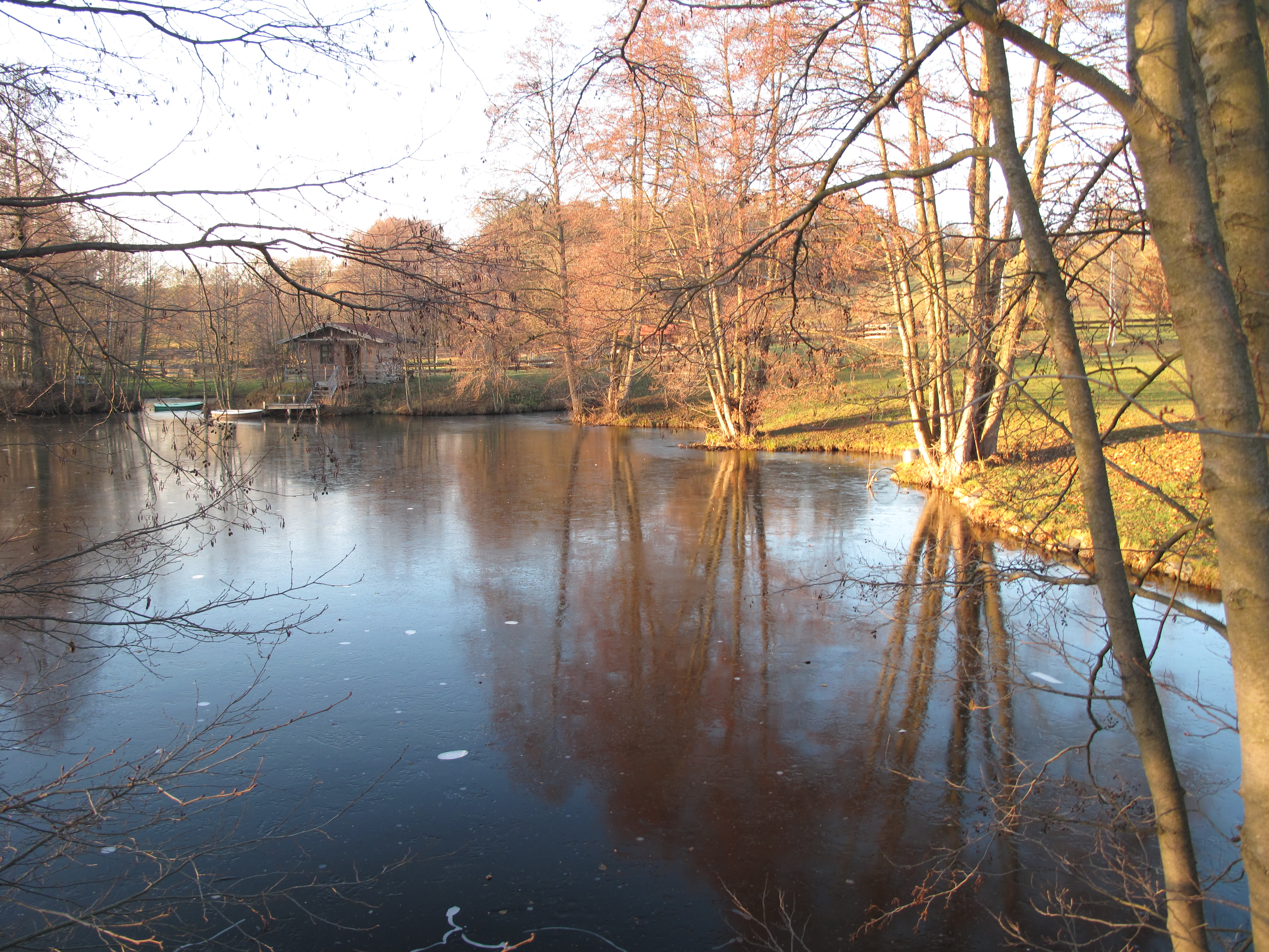 Horní všedobrovický rybník ve Všedobrovicích, okres Praha-východ.